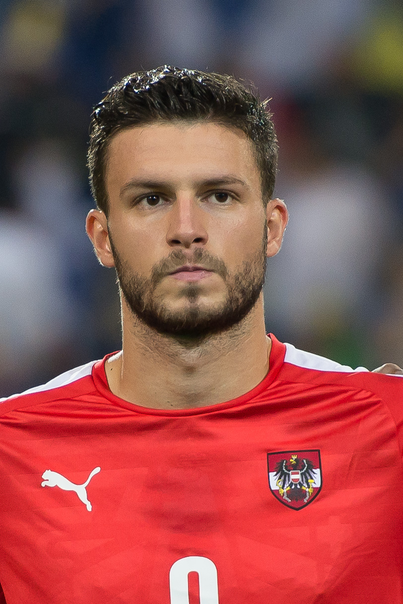 Fußball U21 EM-Qualifikation Österreich gegen Bosnien und Herzegowina St. Pölten, 5. September 2014 Marco Djuricin